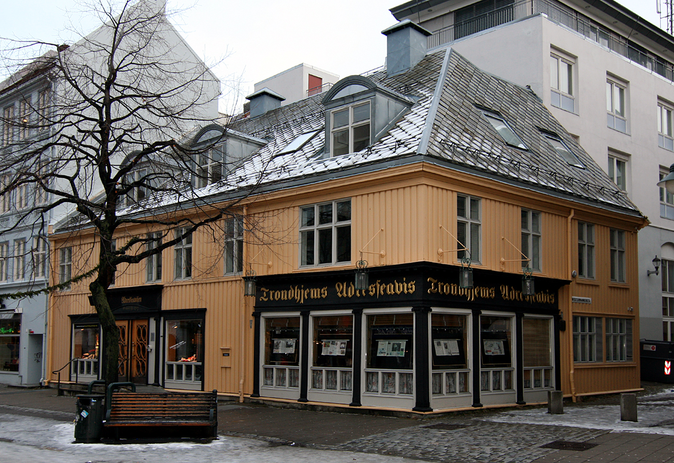 Adresseavisens gård på Nordre i Trondheim. Bygd ca. 1710, ombygd flere ganger, sist en fullstendig innvendig ombygning i 1996 ved Voll Arkitekter.